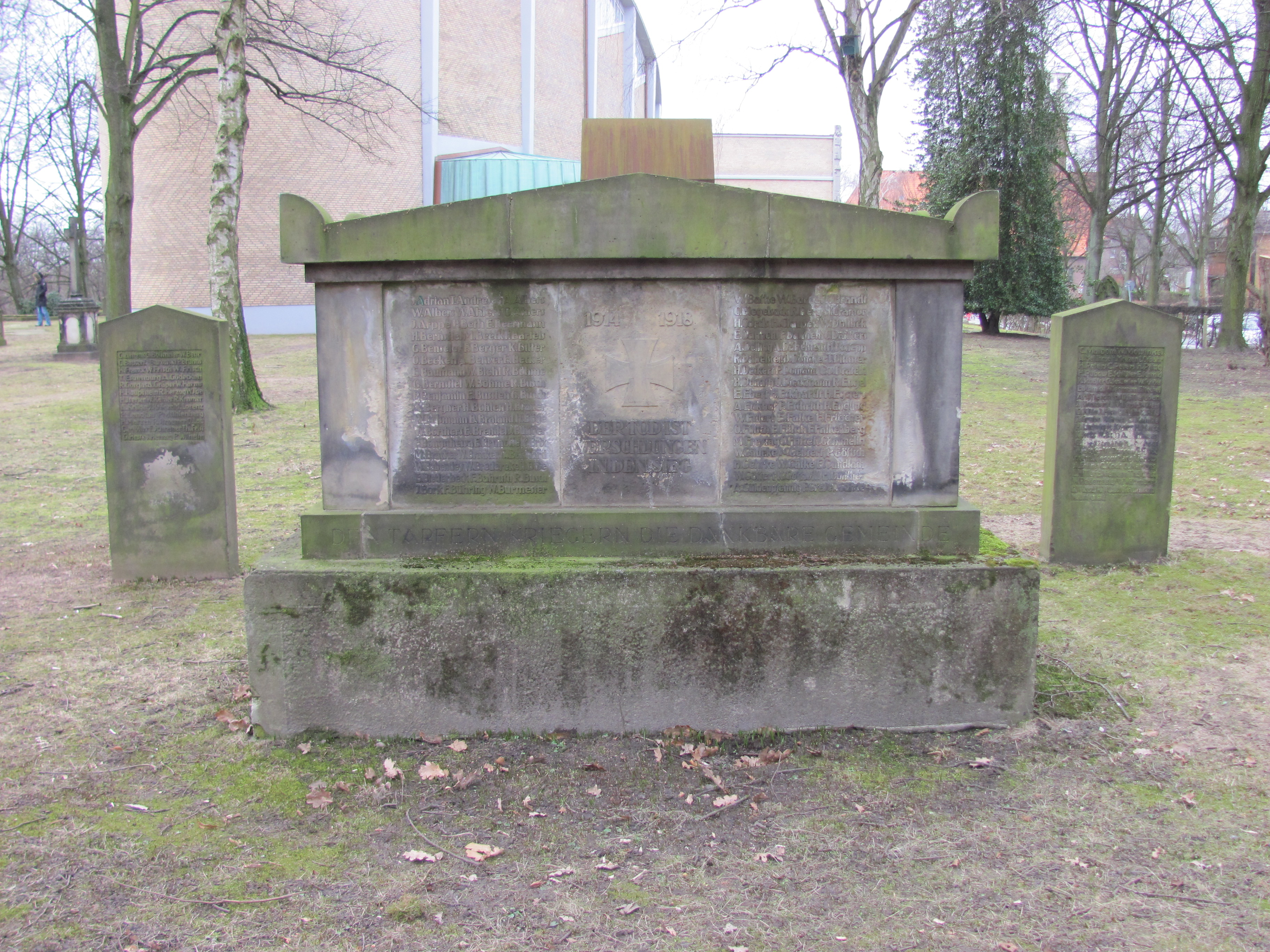 Alter Hammer Friedhof, Mahnmal Erster Weltkrieg